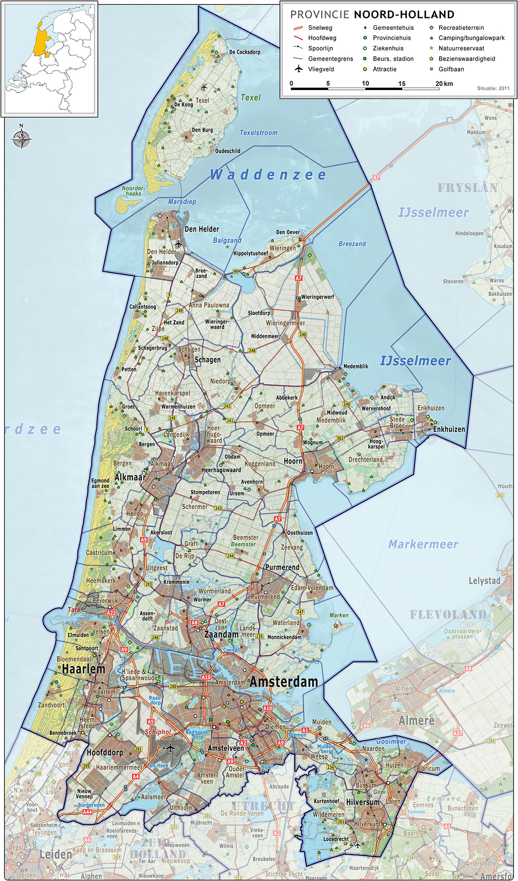 Provincie Noord-Holland, met indeling van gemeenten (2011) en impressie van het landschap. Door Jan-Willem van Aalst, samengesteld uit publiek beschikbare geo-data: Referentie-ondergrond (kustlijn, steden, wegen) gerasterd uit de OpenStreet Map OSM. ( Inhoud is beschikbaar onder de Creative Commons Attribution-ShareAlike 3.0 license. Referentie-ondergrond op water bewerkt vanuit Gebruik is vrij met bronvermelding NLR en ESA. Vectorgrenzen van gemeenten en regio's vrij ter beschikking gesteld met dank aan cartografen van brandweerregio's Hollands-Midden en IJsselland; gerasterd in Photoshop. Hoogte-aanduidingen (reliëf) gerasterd uit de AHN Viewer ( gebruik is vrij met bronvermelding (c) AHN, Locaties verblijfsrecreatie (campings) op basis van Borisweb ( van Kenniscentrum recreatie. Gebruik is vrij, met bronvermelding. Overige kenmerken op de kaart: eigen tekenwerk van Jan-Willem van Aalst, op basis van gerasterde gemeentegrenzen.